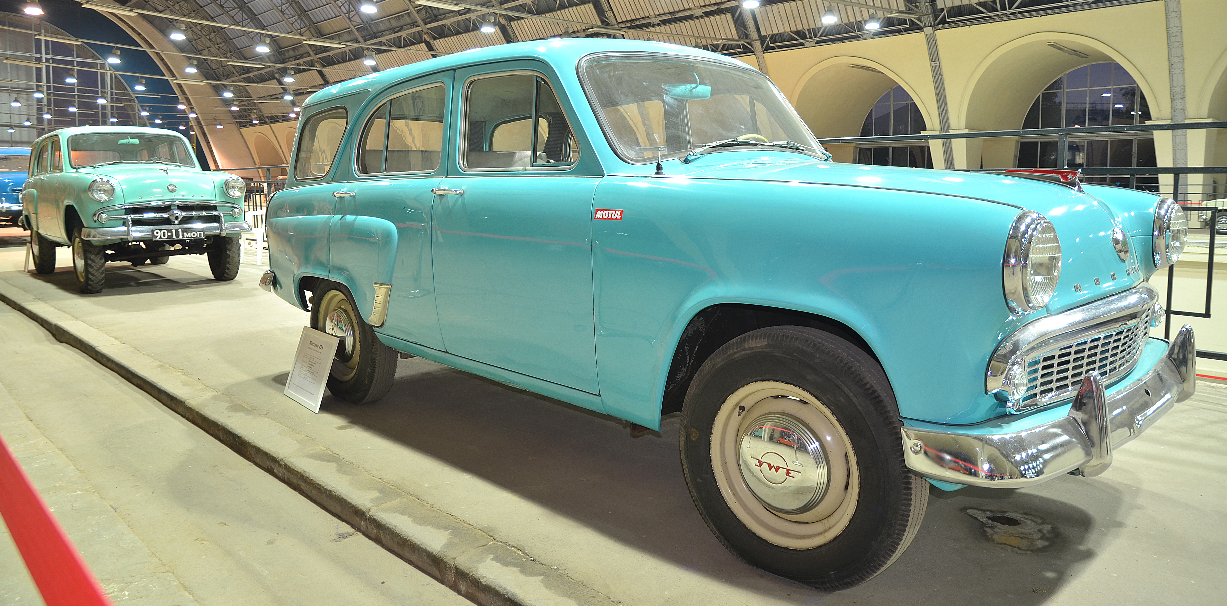 Можно увидеть здесь : You can see here